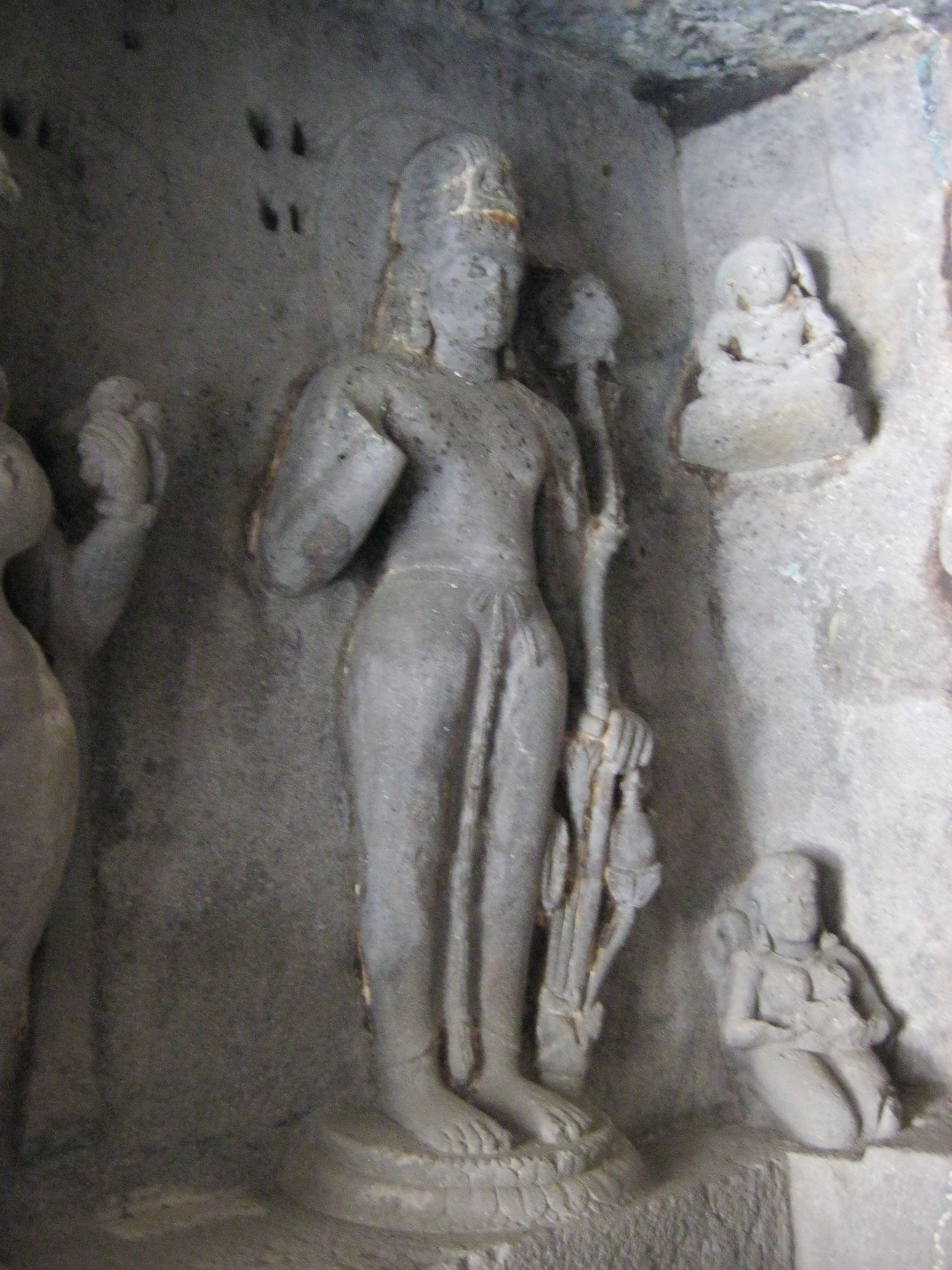 இராமன் வில்-வீரன்